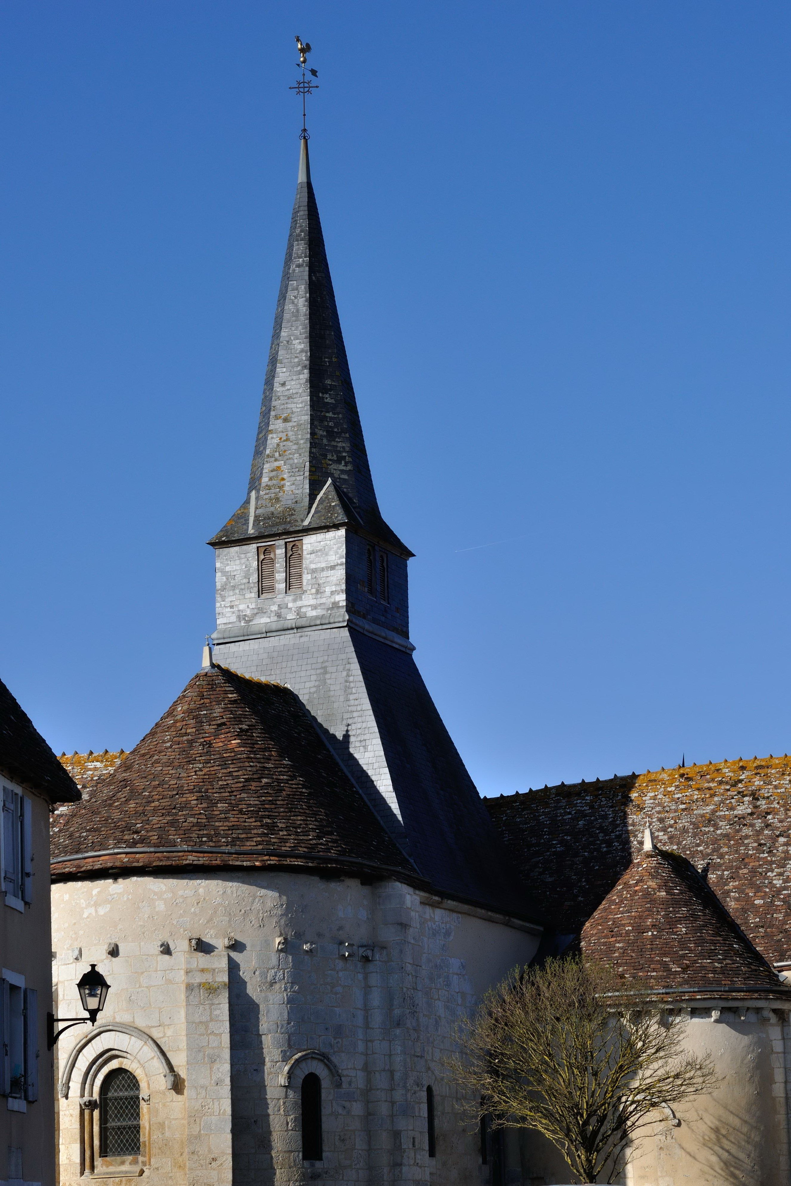 Eglise Saint-Denis, Rivarennes (Indre).